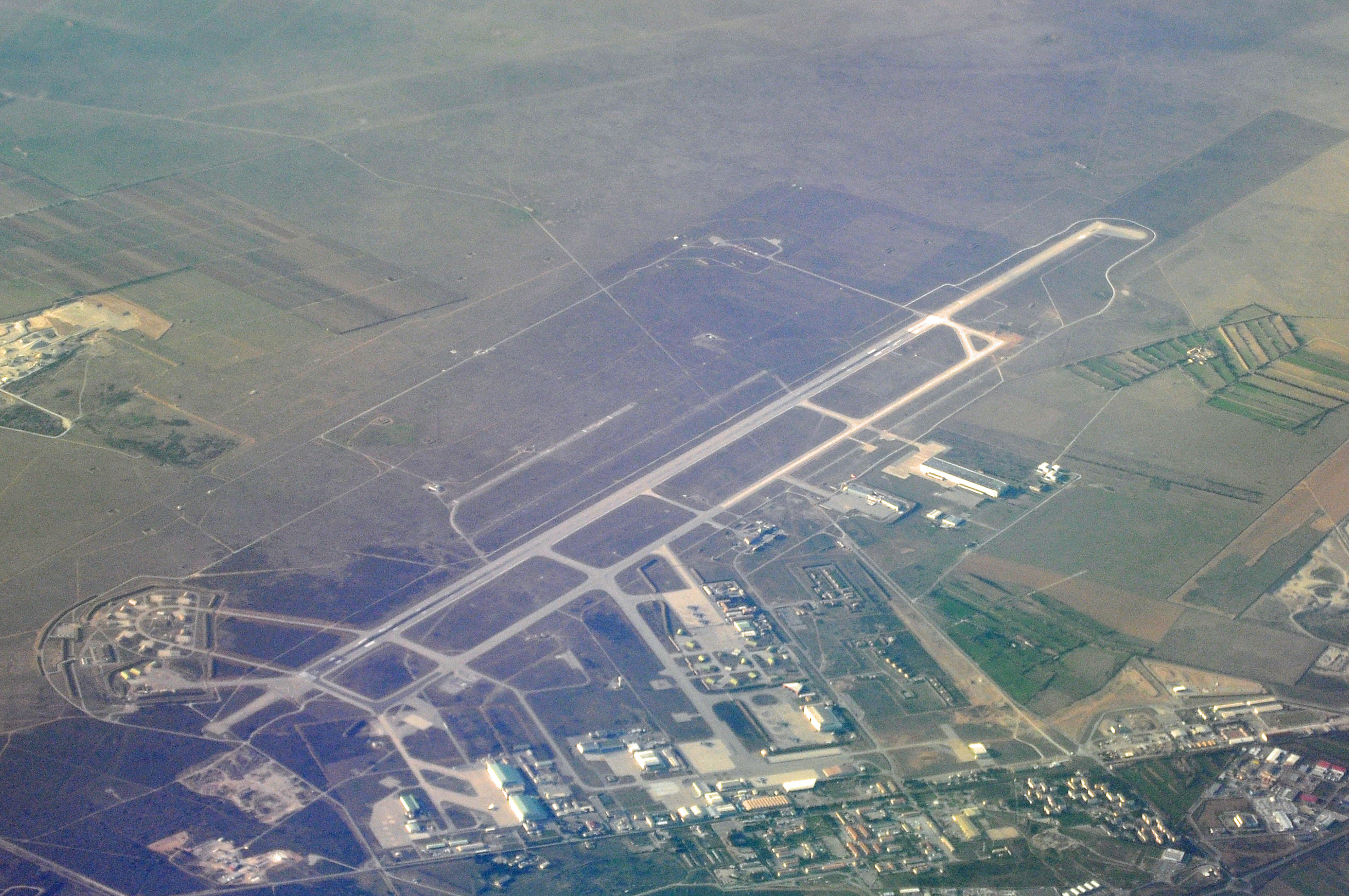 FROM 787 F-HRBA AF 789